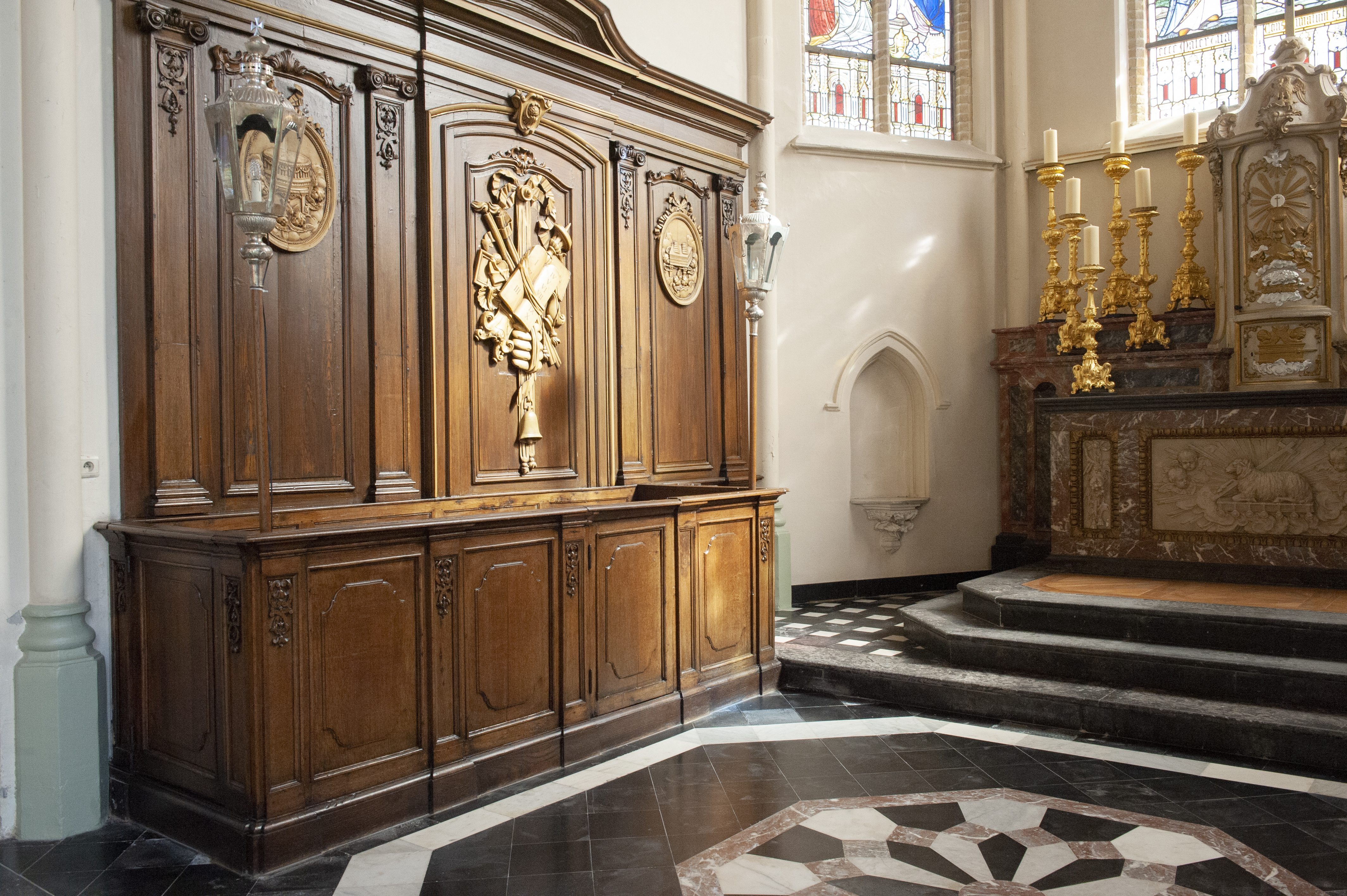 Een koorbank